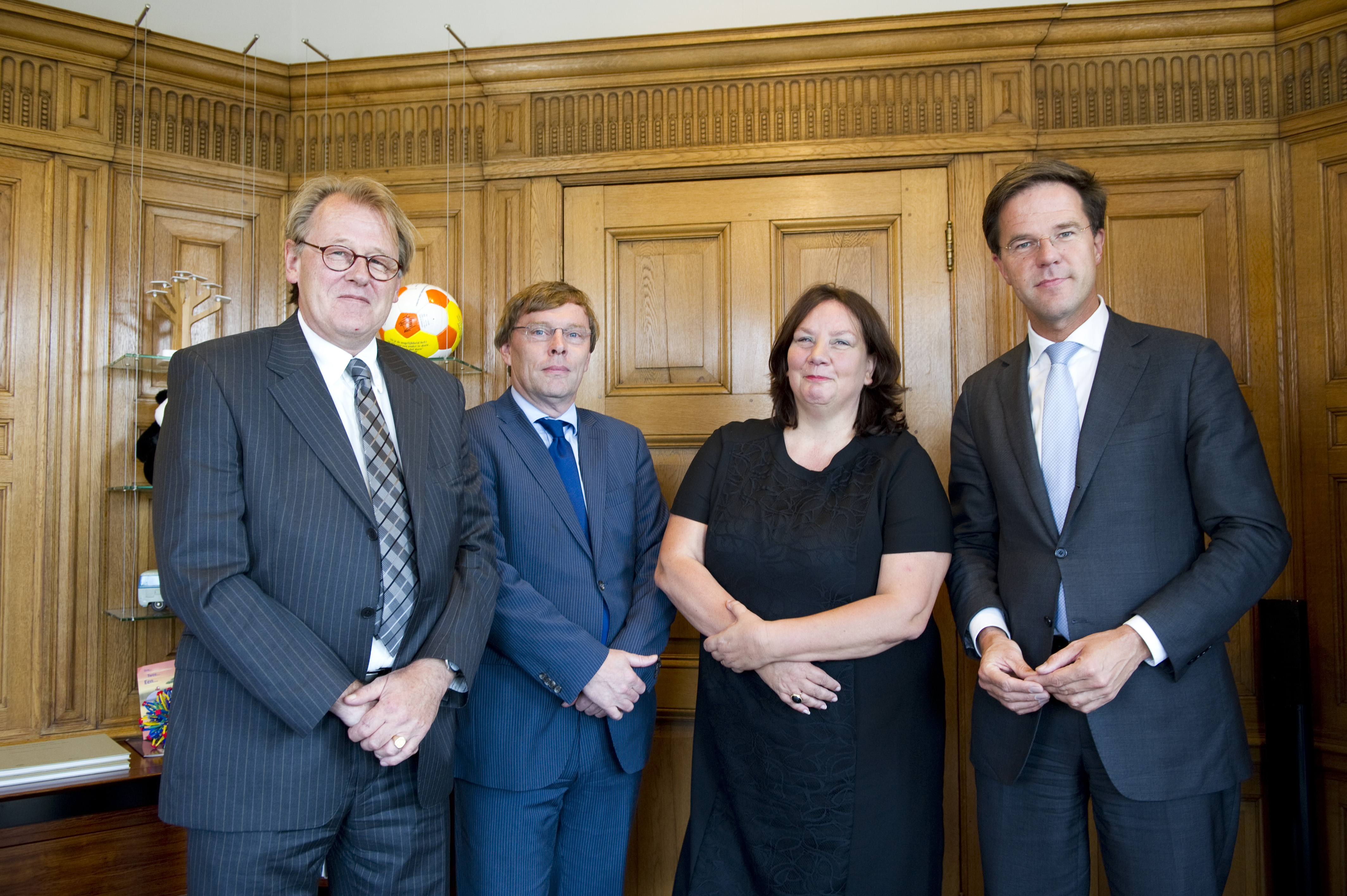 Minister-president Rutte ontvangt de voorzitters van de vakbonden FNV, CNV en MHP in het Torentje. De minister-president spreekt met Agnes Jongerius (FNV), Jaap Smit (CNV) en Bob van der Wal (MHP) over de aanpak van de schuldencrisis.